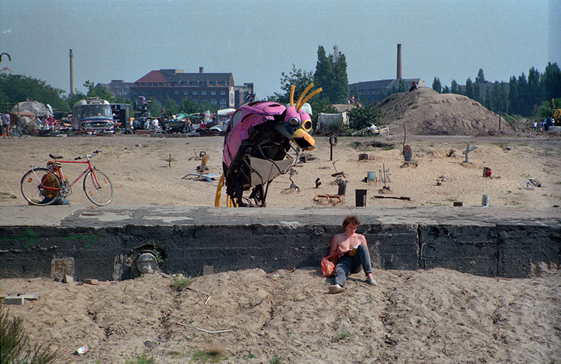 Görlitzer Park: Anlage in den 1990er-Jahren nach dem Abriss des Görlitzer Bahnhofs. Die Mulde.